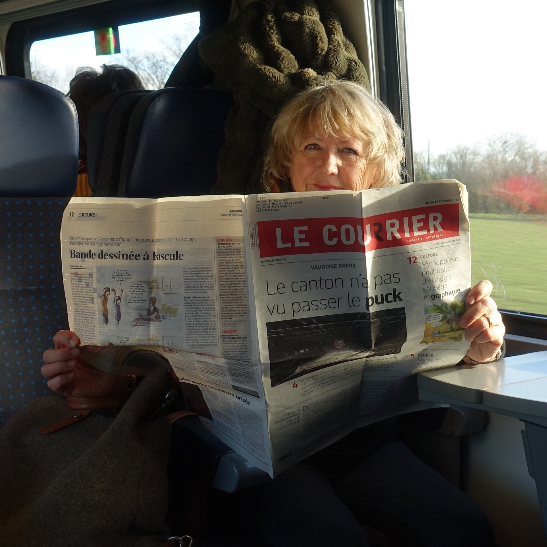 Une lectrice avec le Courrier de Genève dans le train